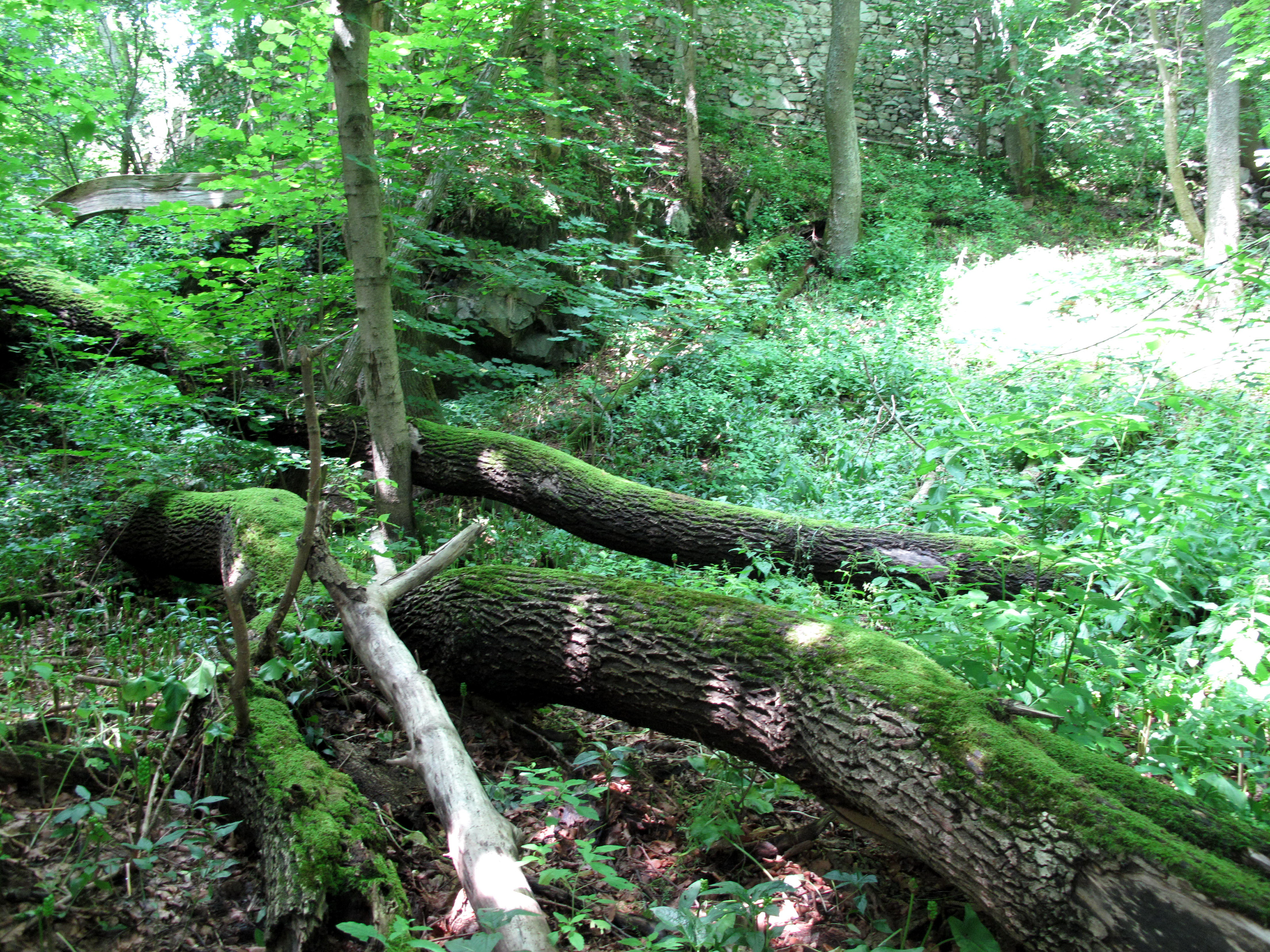 Přírodní rezervace Herštýn